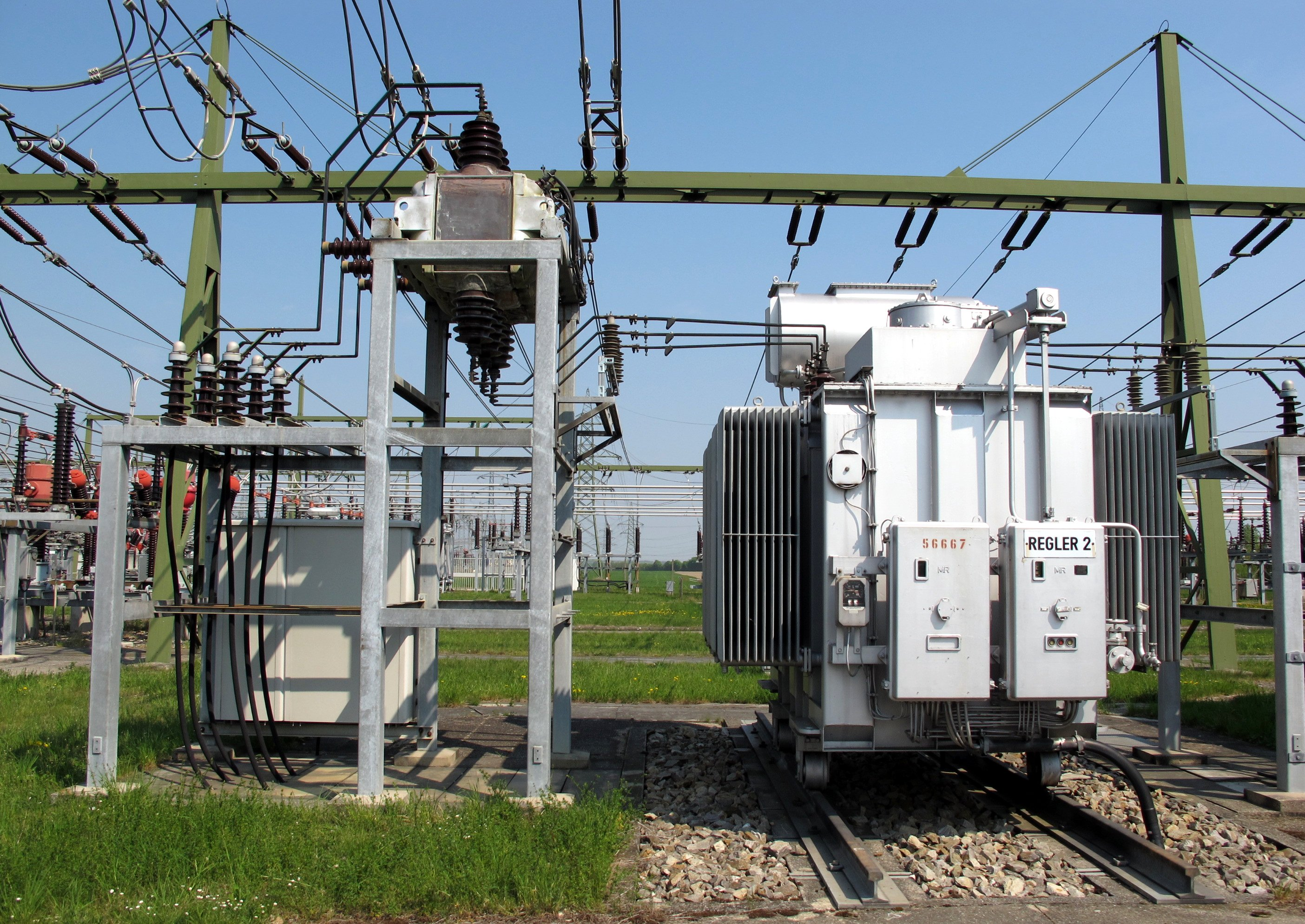 Umspannwerk Dürnrohr; Anlage zur Einspeisung von Rundsteuersignalen auf Mittelspannungsebene